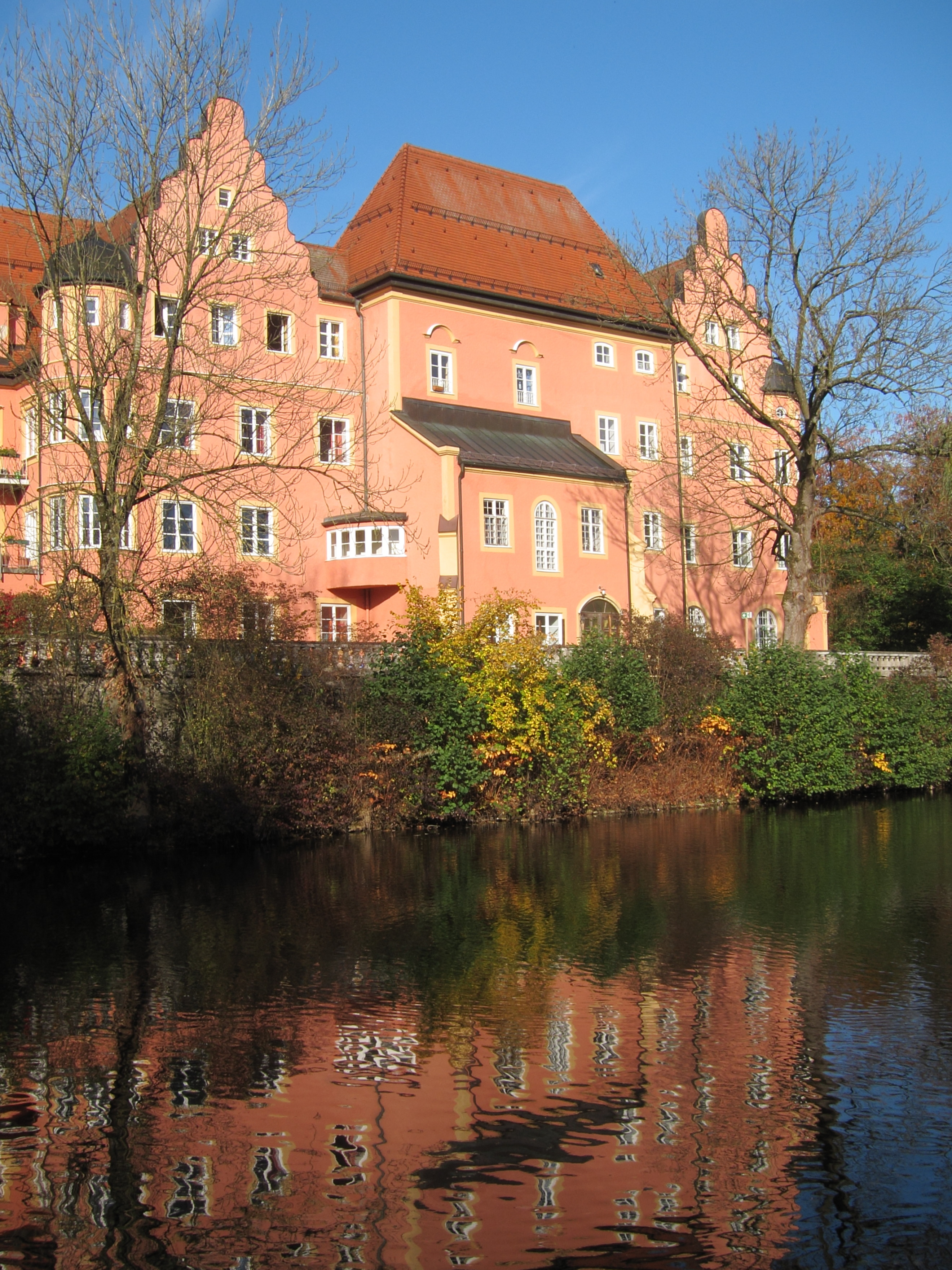 Ehemaliges Wasserschloss; dreigeschossiger Hauptbau mit Schlosskapelle, Ecktürmen, Schweifgiebeln und flankierenden Pavillons, im Kern 16./17. Jahrhundert, 1898 Umbau in Neurenaissanceformen; mit Ausstattung; Terrasse; Schlossbrücke über den Wassergraben, im Kern vor 1800.